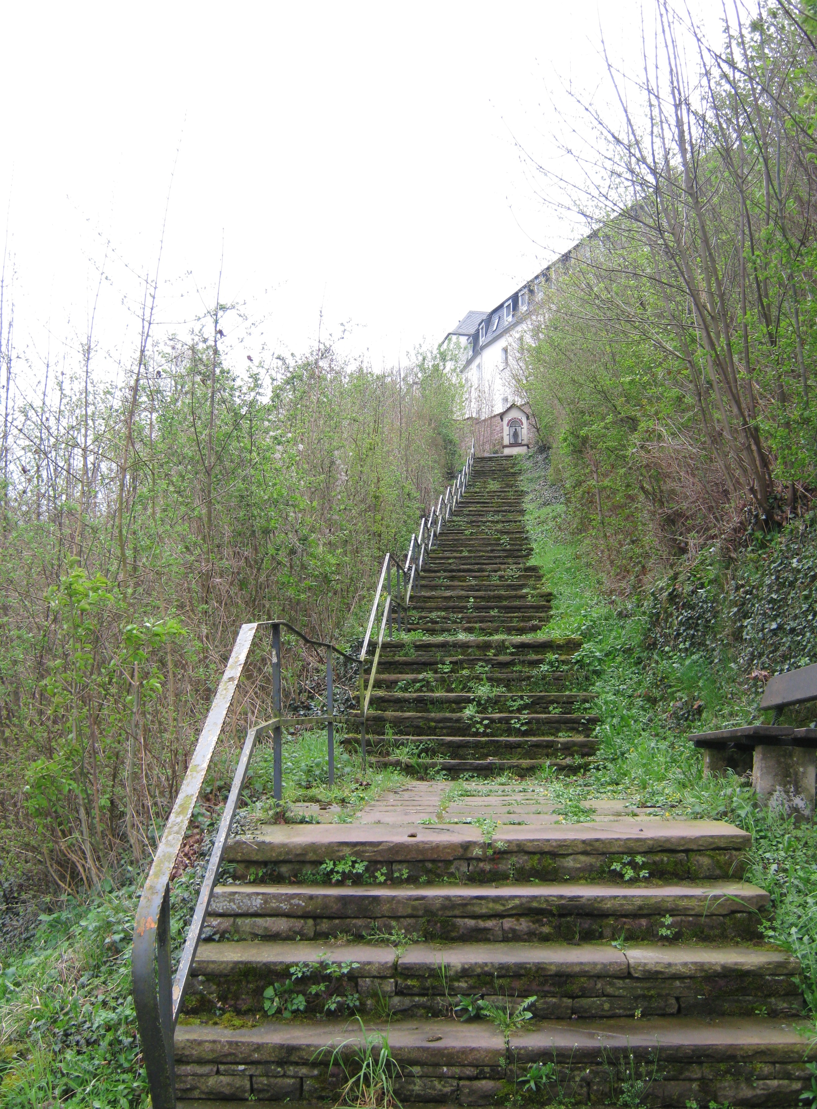 Klostertreppe in Herstelle, ursprünglicher Zugang zur Klosterpforte der oben auf dem Berg liegenden Abtei vom Hl. Kreuz, heute noch - mit Vorsicht - begehbar.